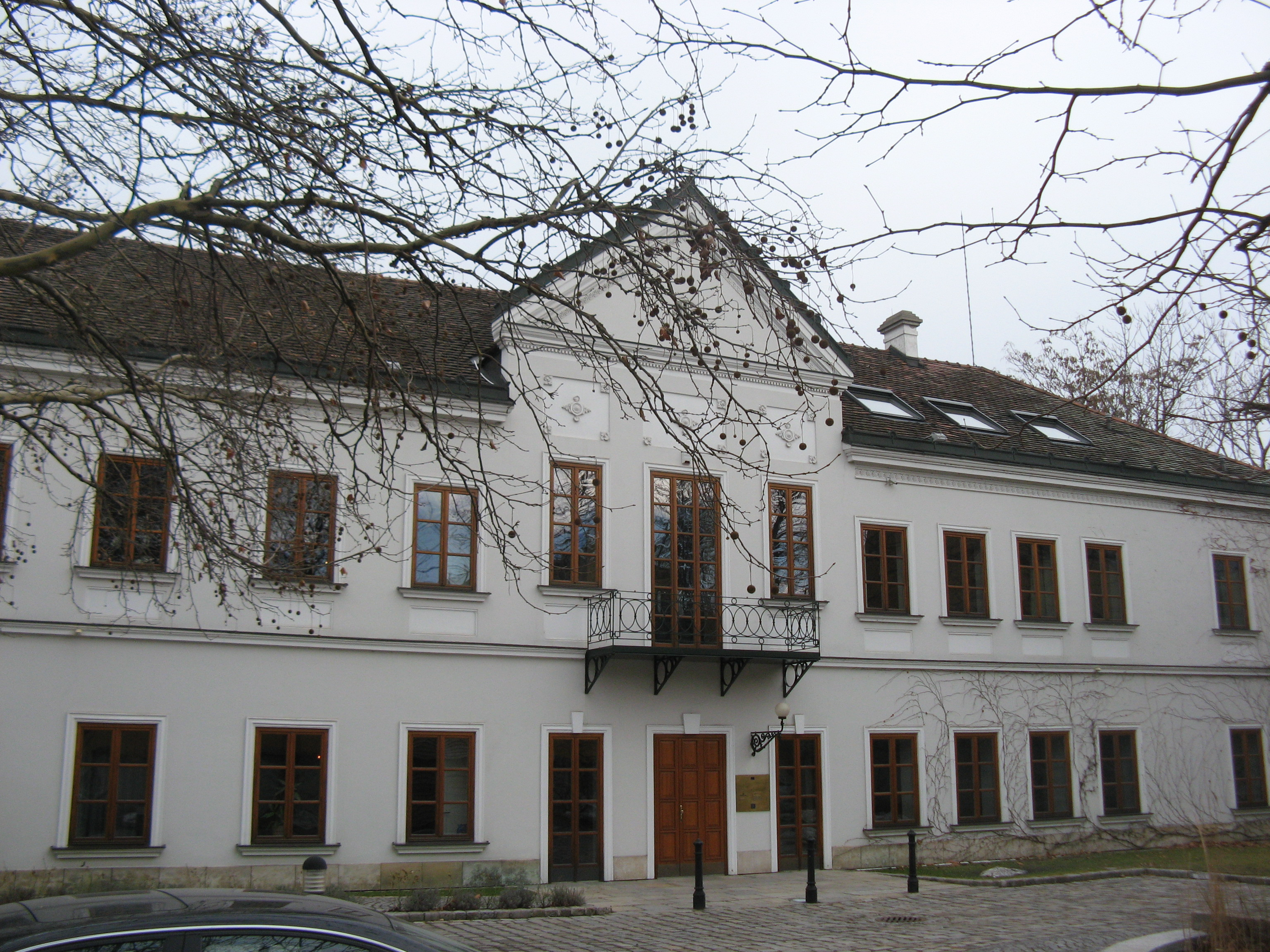 Landhaus (um 1840-50), Neilreichgasse 193, Wien-Inzersdorf